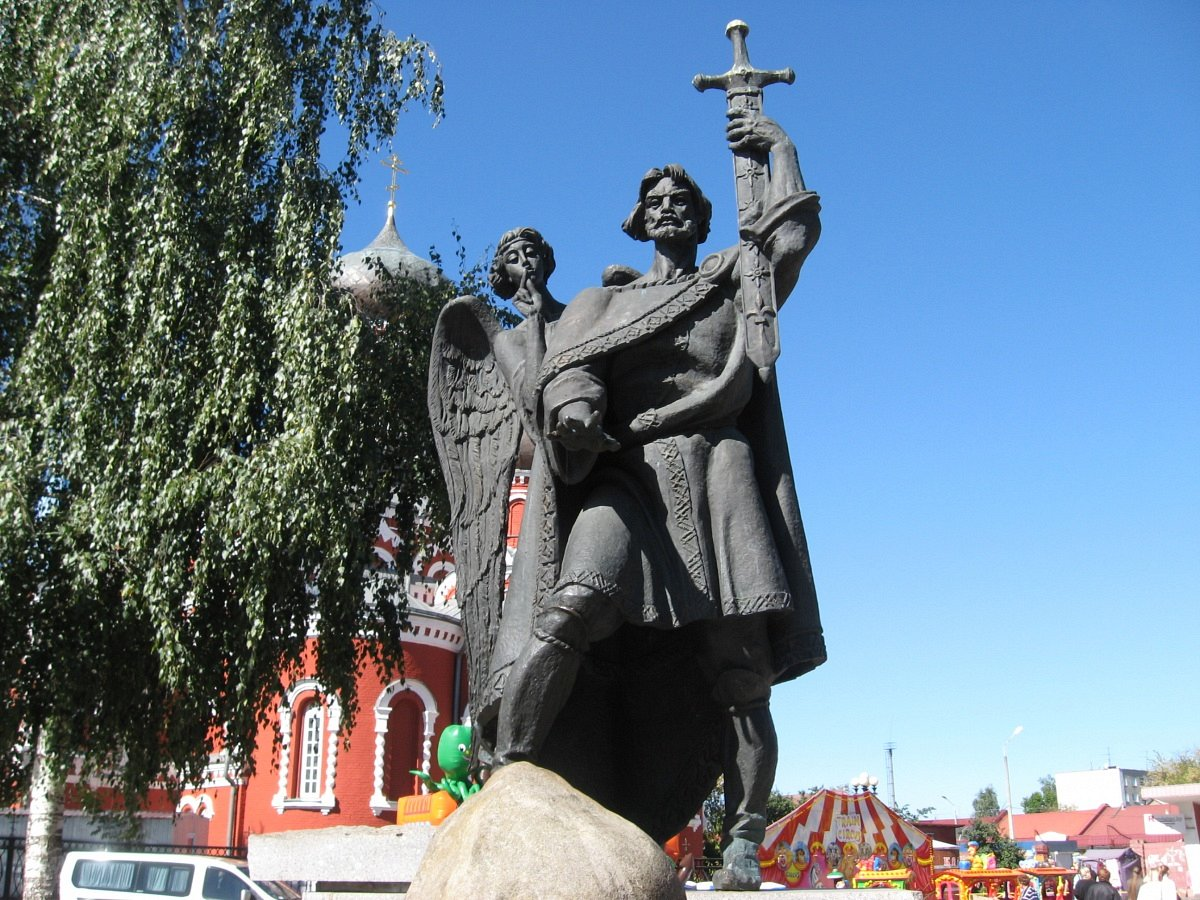 Барысаў. Помнік князю